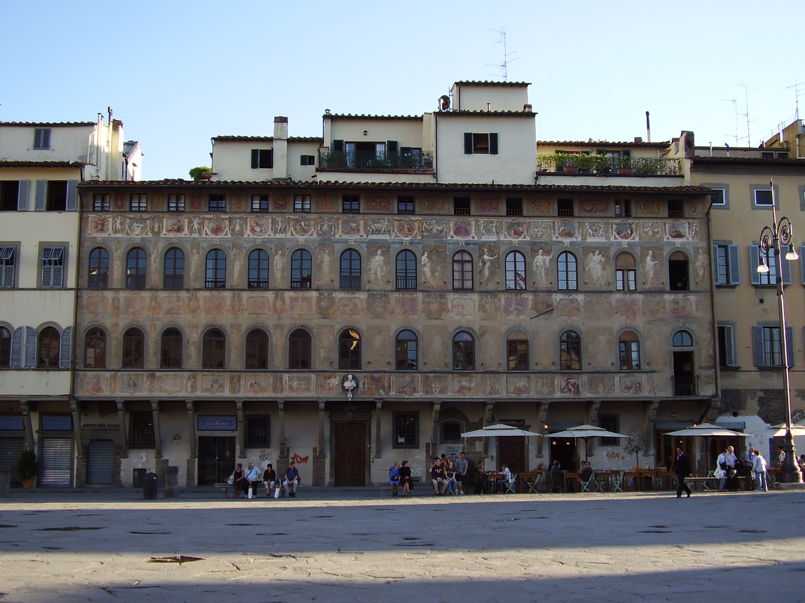 Palazzo dell'Antella in Piazza Santa Croce, in Florence, Italy